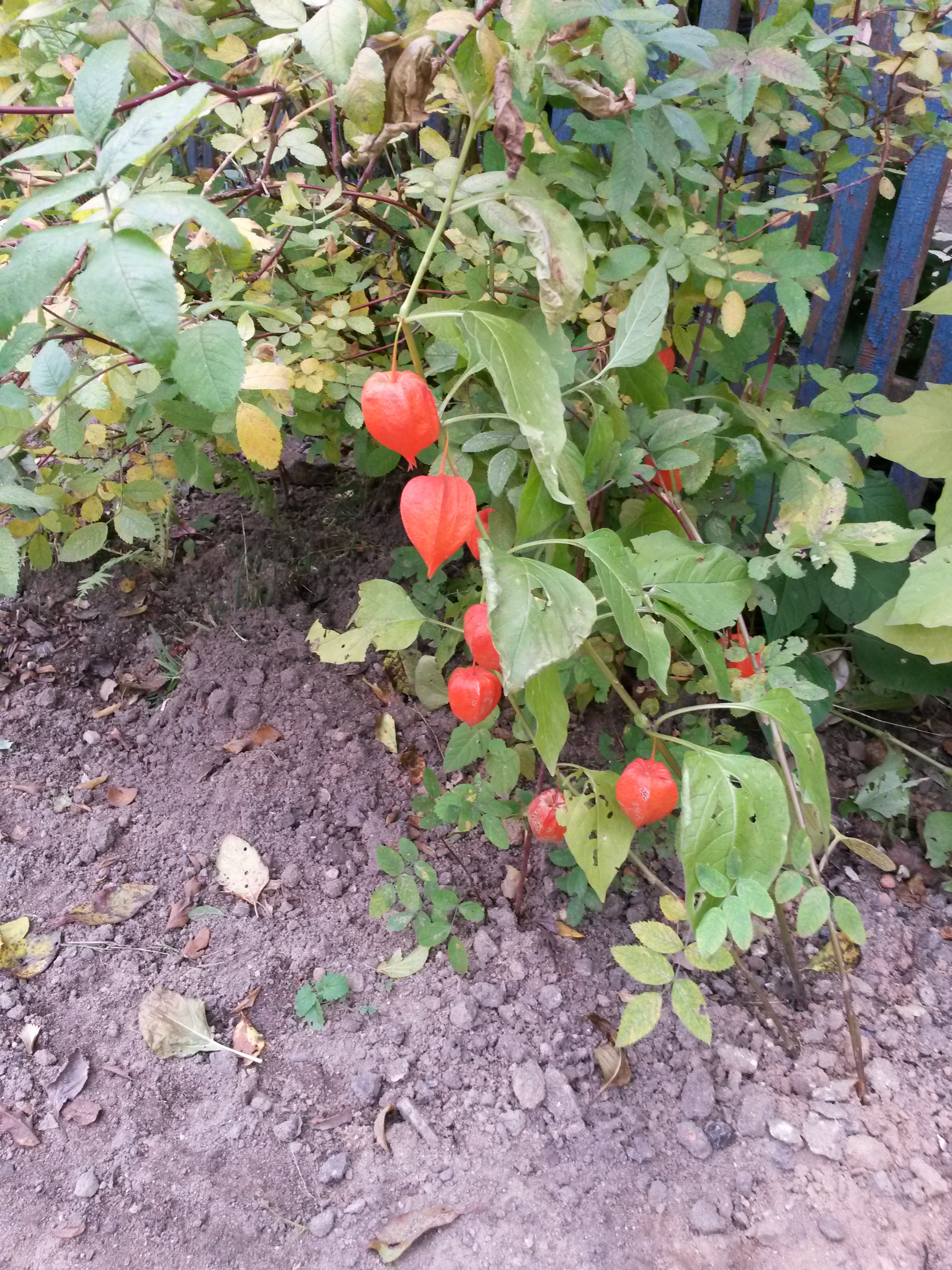 Неизвестное растение в Минске